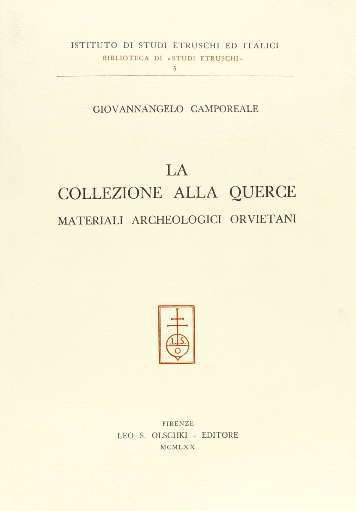 Giovannangelo Camporeale: La collezione alla querce. Materiali archeologici orvietani. Olschki, Firenze 1970, ISBN 9788822215482.